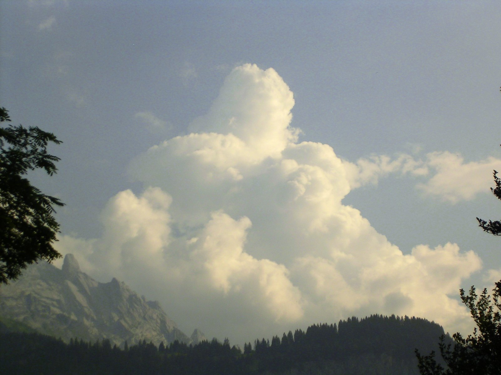 (en) Cumulus congestus above mountains (de) Cumulus congestus über den Bergen Aufnahmeort: Meiringen, BE, Schweiz Bearbeitung: GIMP Kontrast angepasst (Kurven) Zugeschnitten Helligkeitswert angepasst Farbton extrem korrigiert